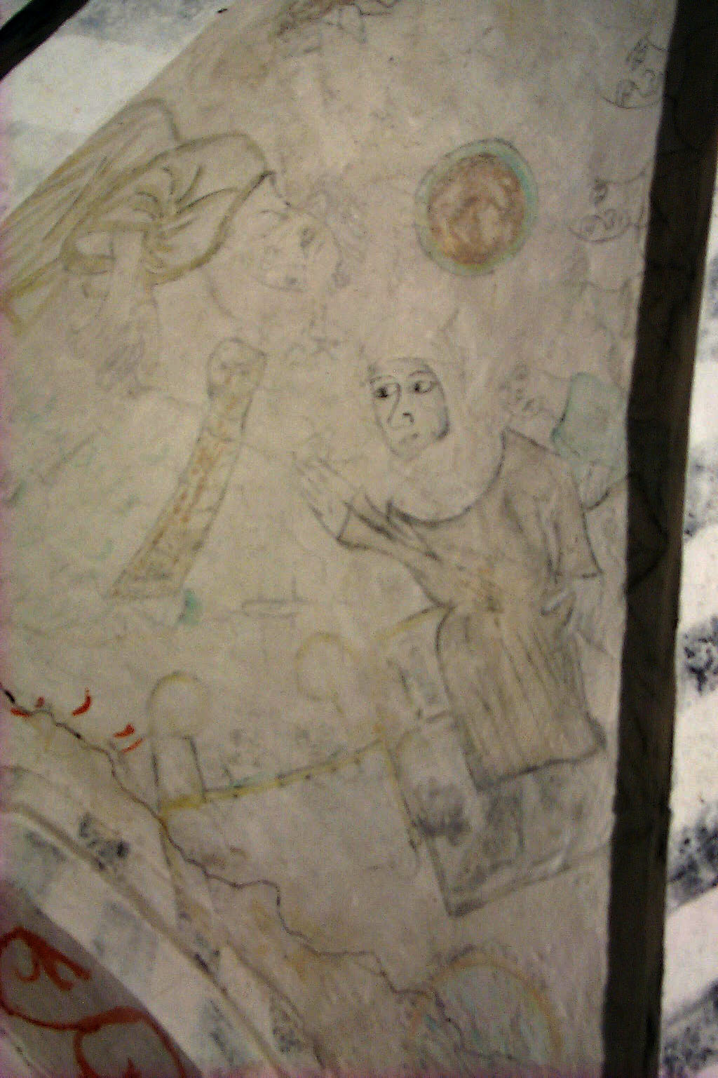 Den medeltida kyrkan i Stora Hammar, Skåne, Sverige.